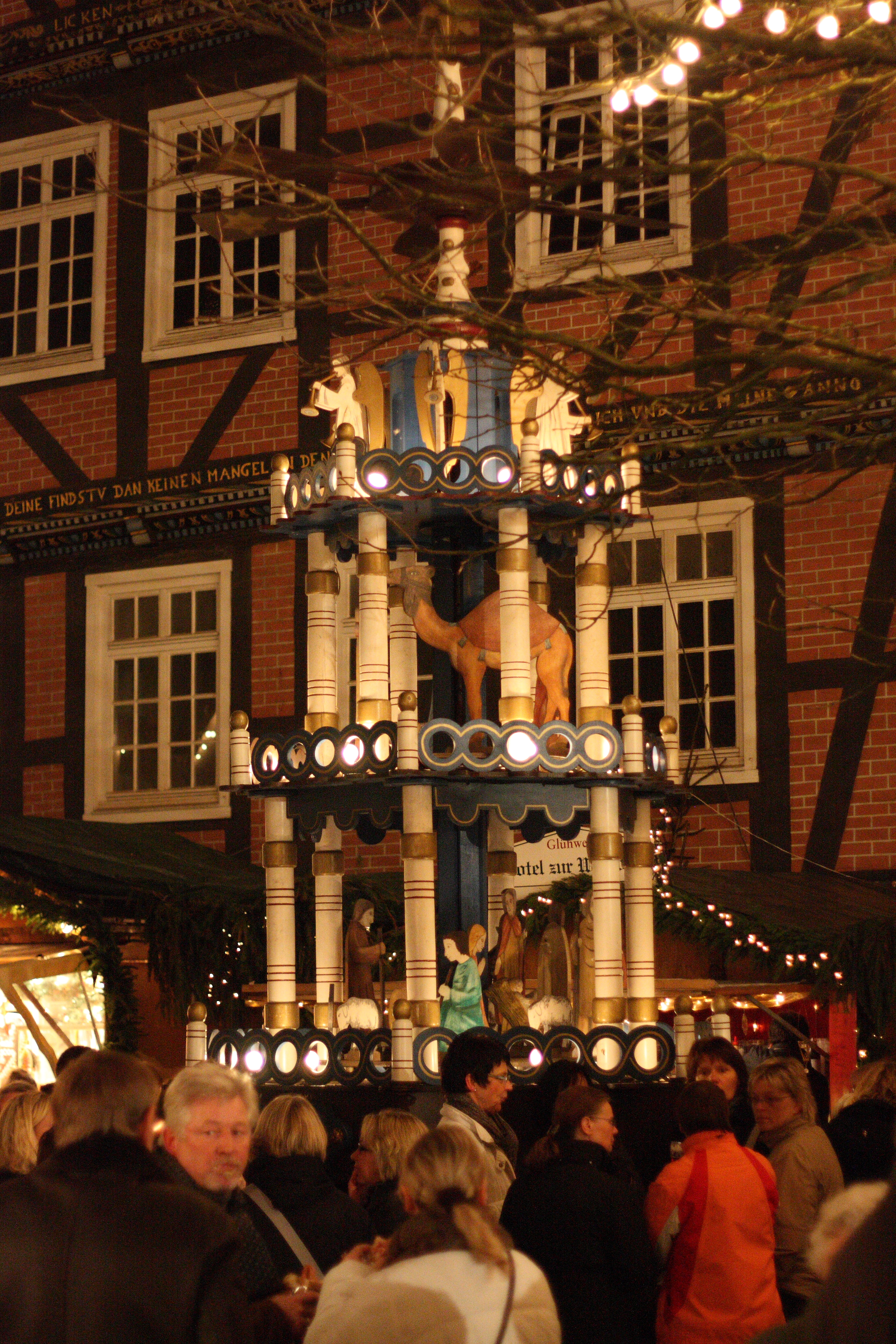 Pyramide auf dem Christkindelmarkt in Wiedenbrück